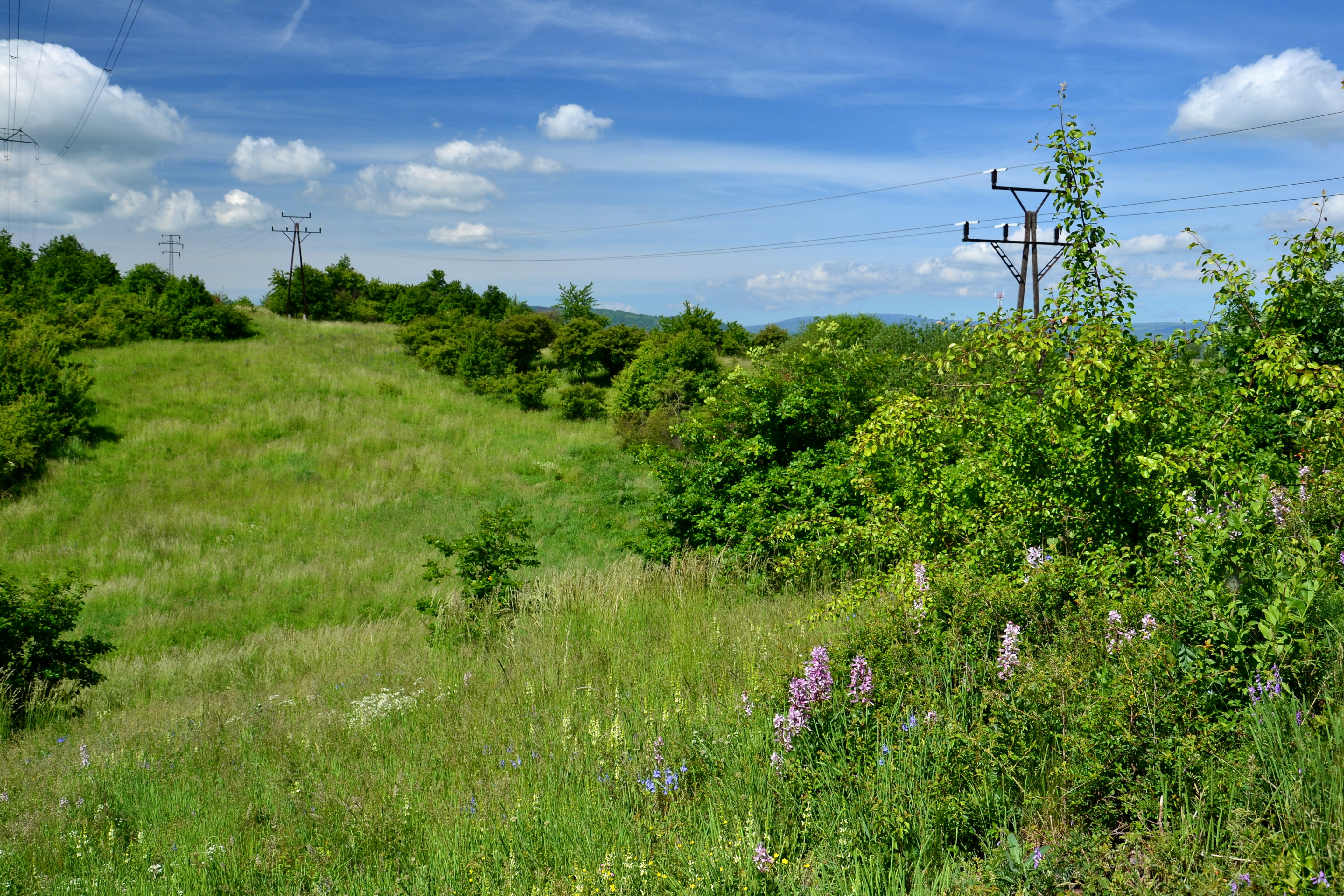 Severní část rezervace tvoří louka s roztroušenými keřy